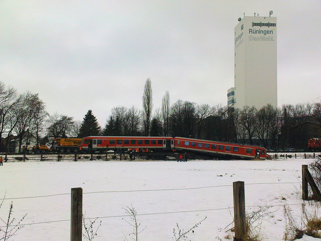 Zugunglück Braunschweig 20.01.2010